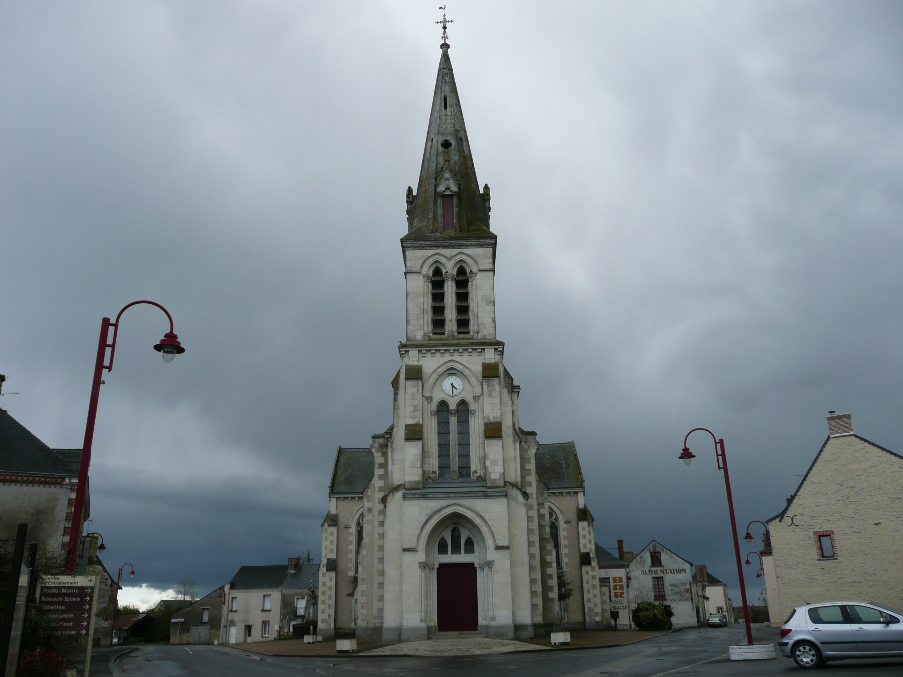 Senonnes - Bourg - Église Saint-Pierre et Saint-Paul